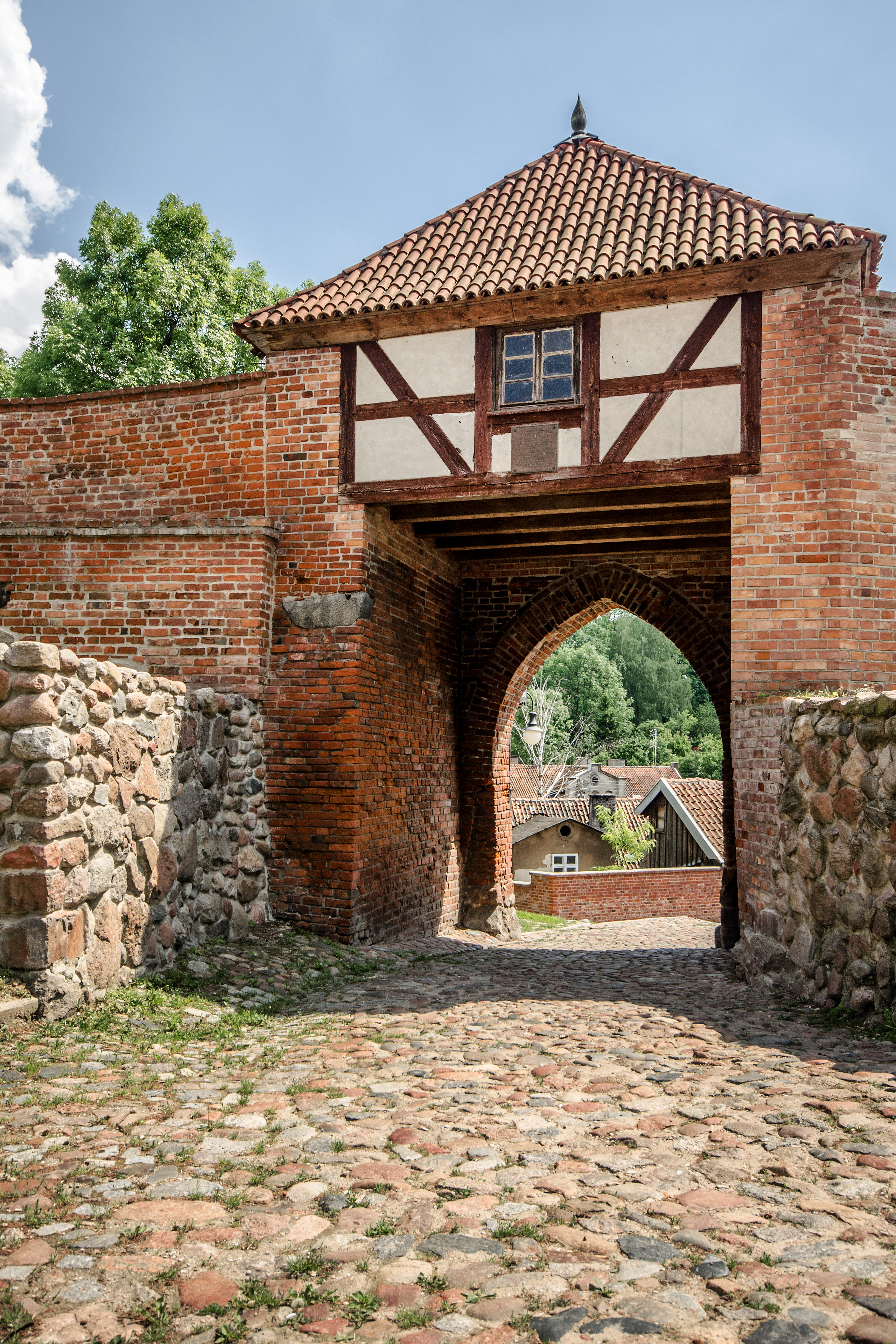 Pasłęk, pozostałości obwarowań miejskich, XIV, XVIII